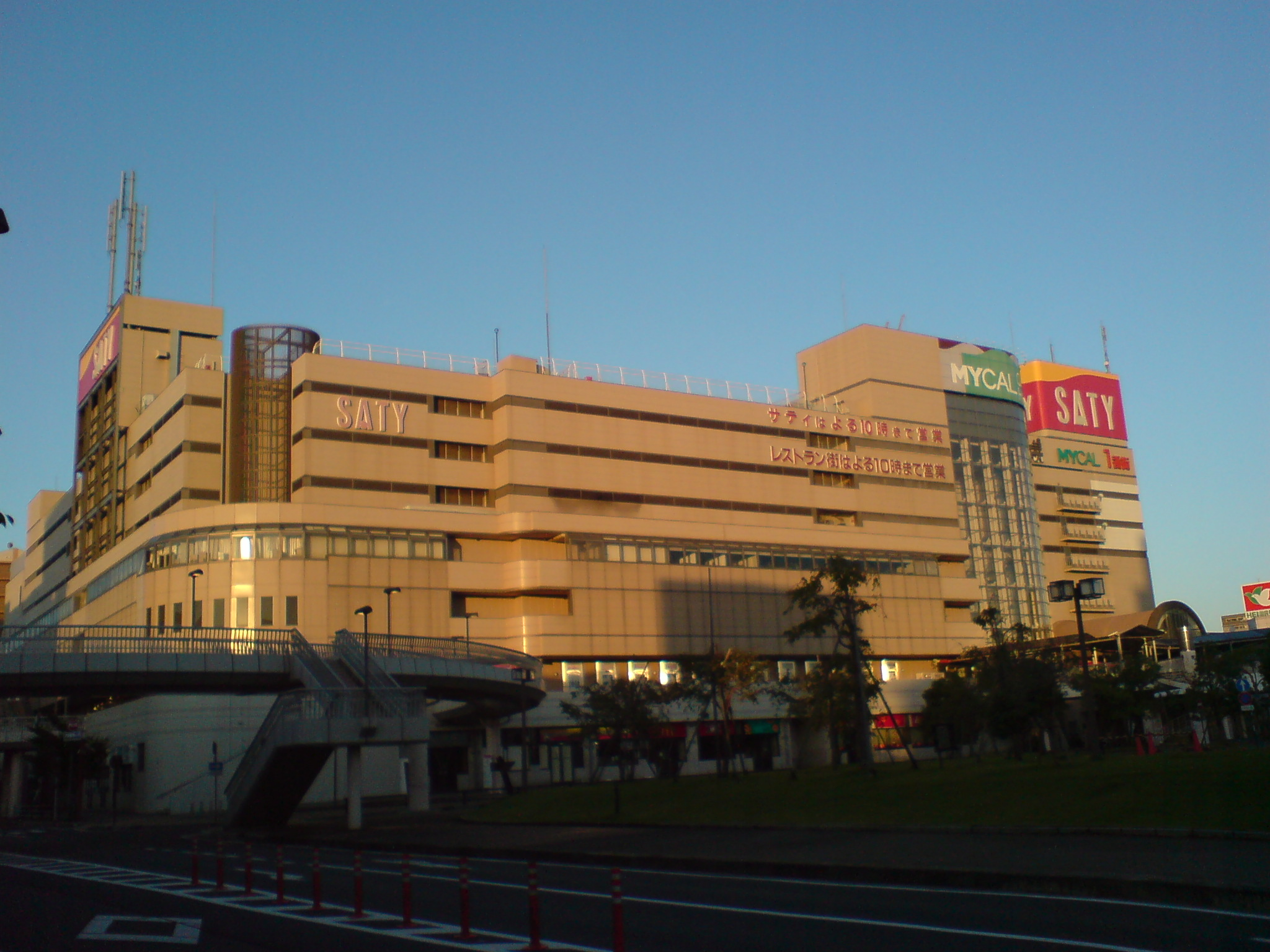 マイカル近江八幡の1番街の店舗画像